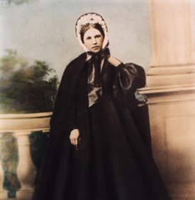 Bl. Frances Siedliska